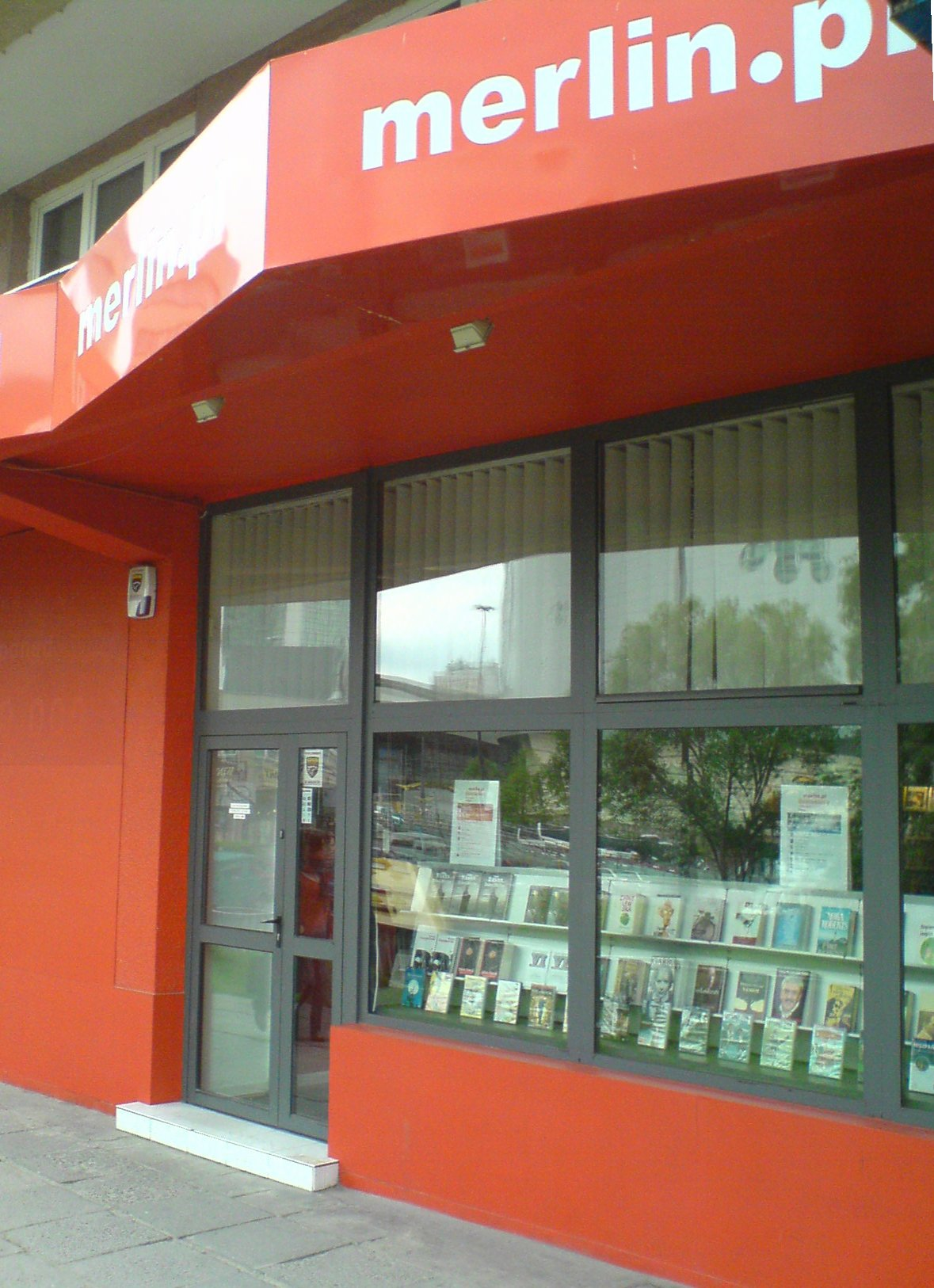 PL, Warszawa, Sklep Merlin.pl, ul. Złota 61